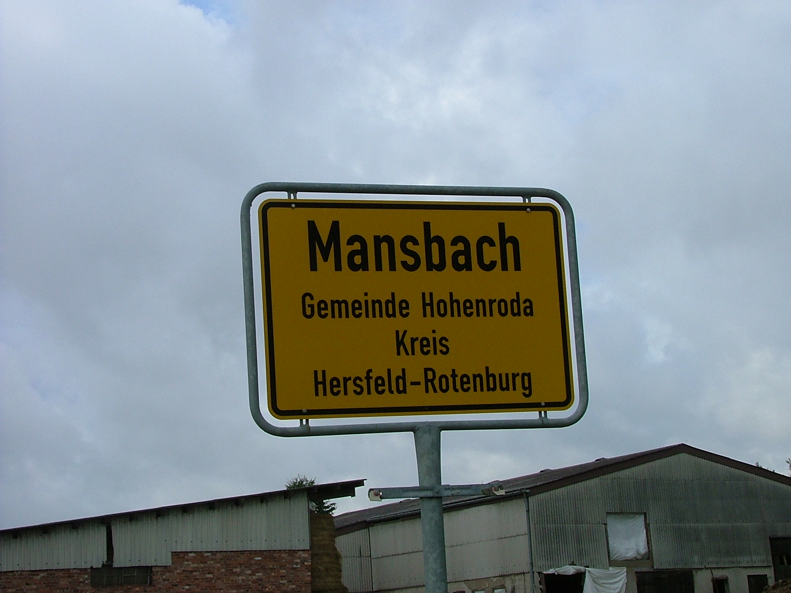 שלט הכניסה לכפר מנסבאך.